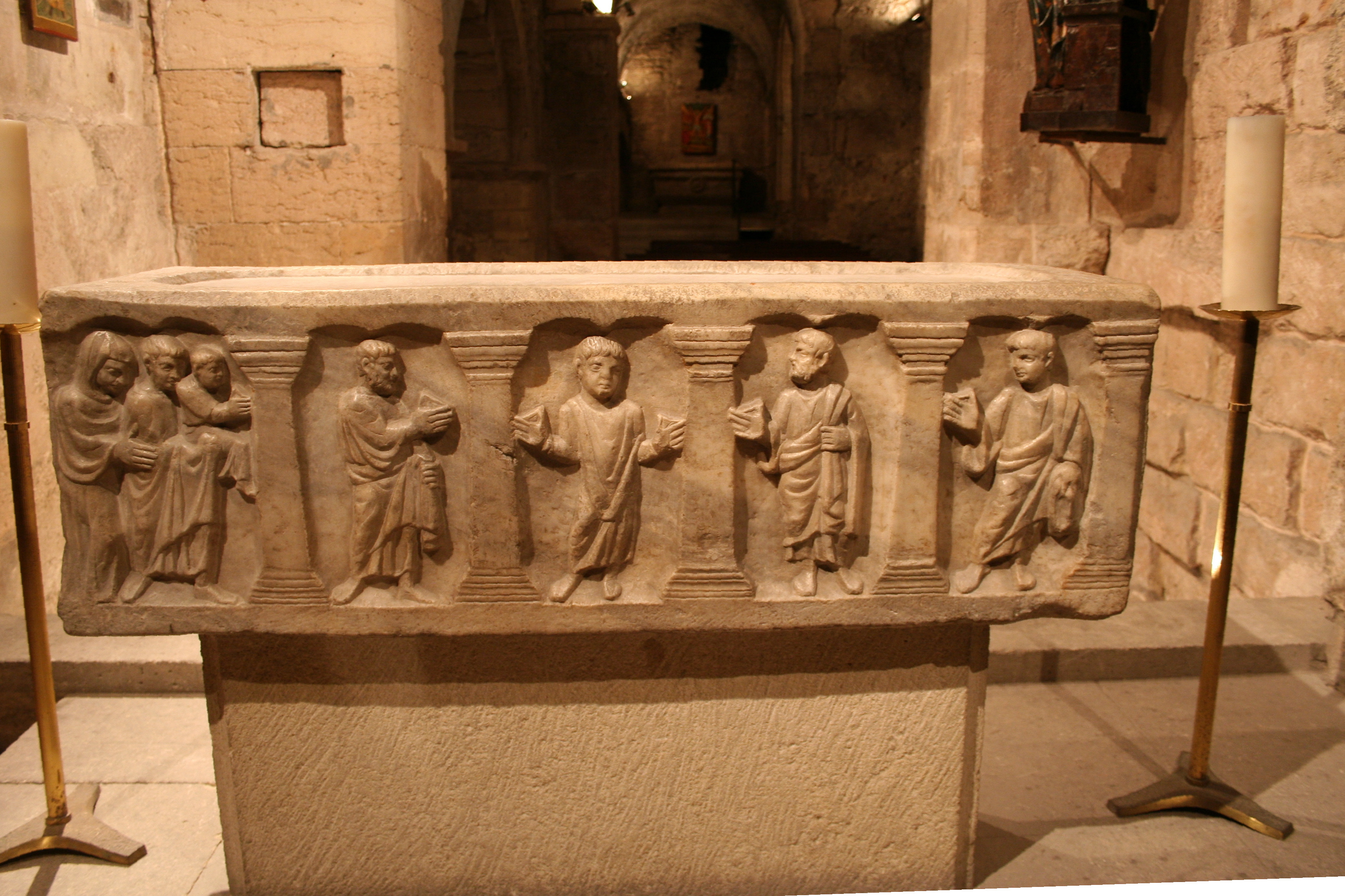 Sarcophage de la première moitiè du Ve siècle situé dans la crypte de l'abbaye de Saint-Victor à Marseille. Il était destiné à un enfant.